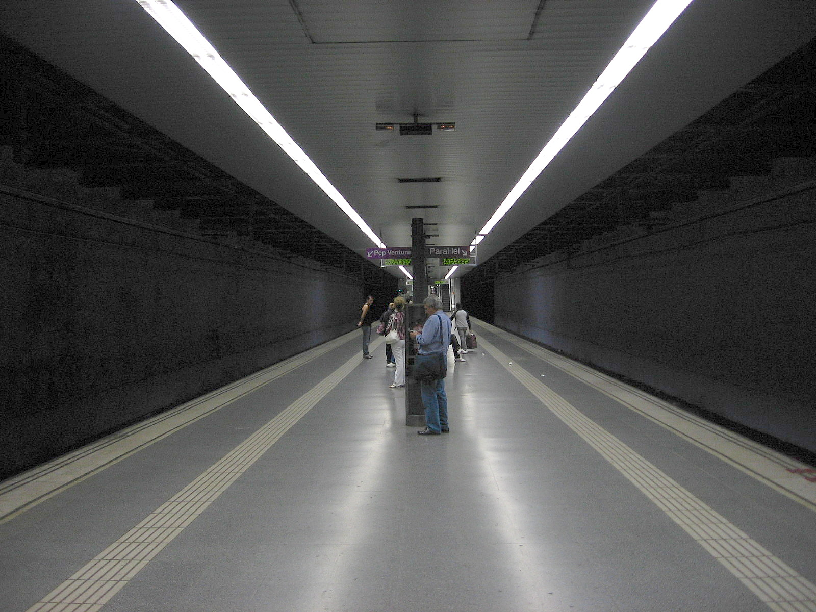 Platform of Sant Antoni metro station, Barcelona/Andana de l'estació Sant Antoni del metro de Barcelona